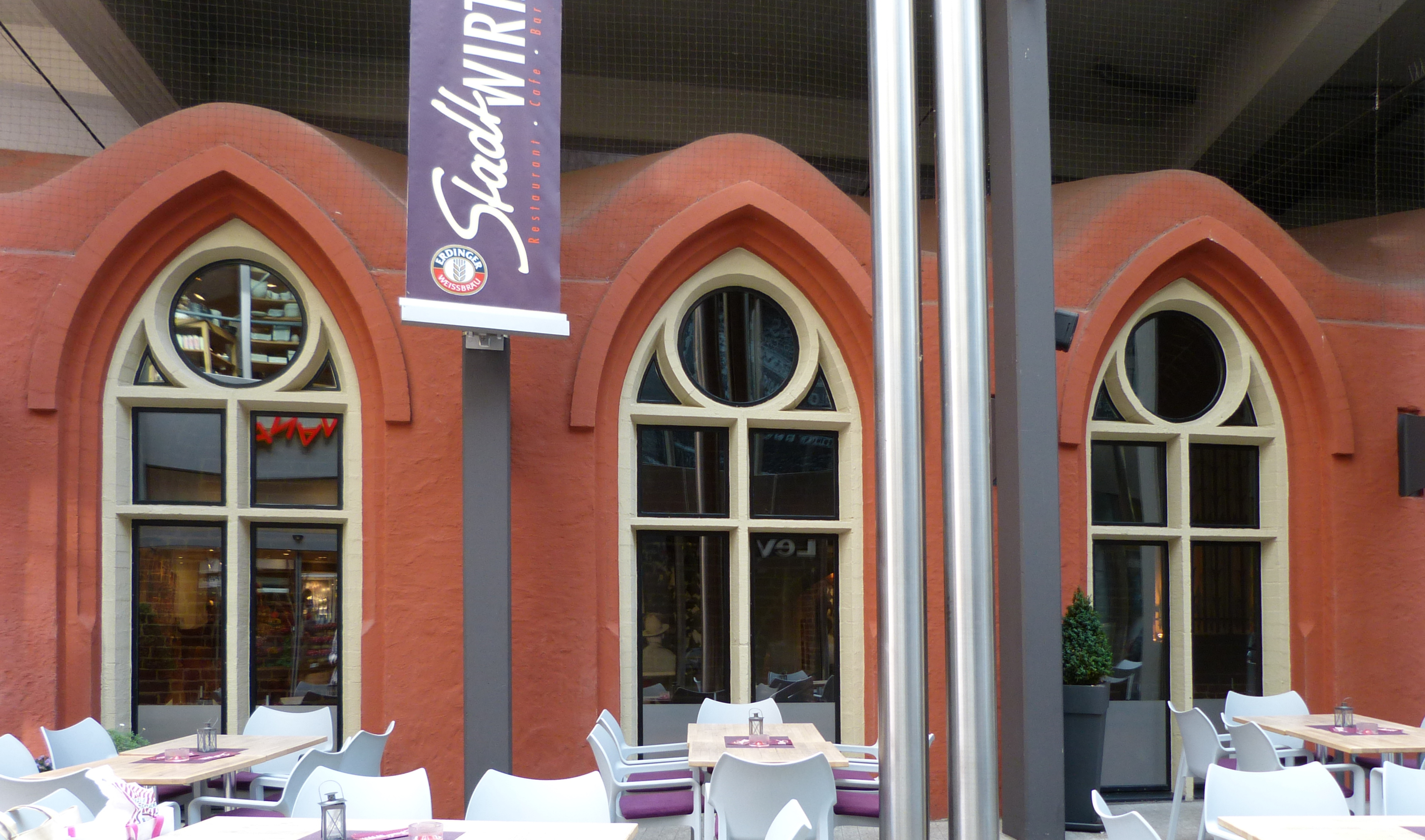 Katharinenkloster, Refektorium in Bremen, Katharinenklosterhof 7Das abgebildete Objekt ist ein geschütztes Kulturdenkmal in der Freien Hansestadt Bremen, mit der Nr. 0642 beim Landesamt für Denkmalpflege registriert.